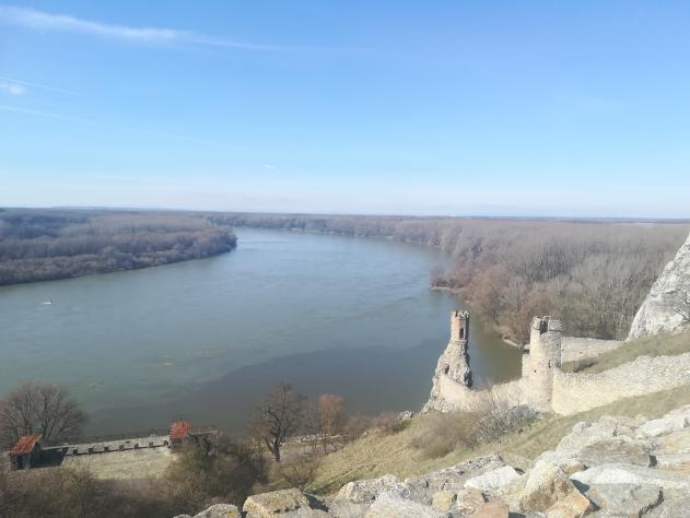 Dunaj z murów zamku Devín w Bratysławie